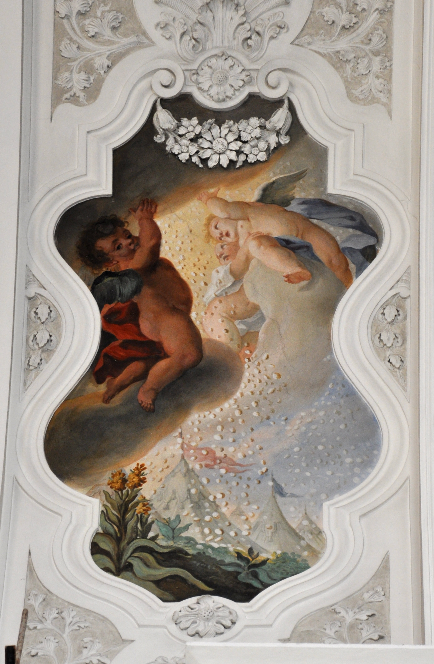 Weingarten (Württemberg) , Basilika St. Martin und Oswald, Fresken von Cosmas Damian Asam, 1718–1720 Fresken im südlichen Querschiff, Thema "Eucharistie": Mannaregen